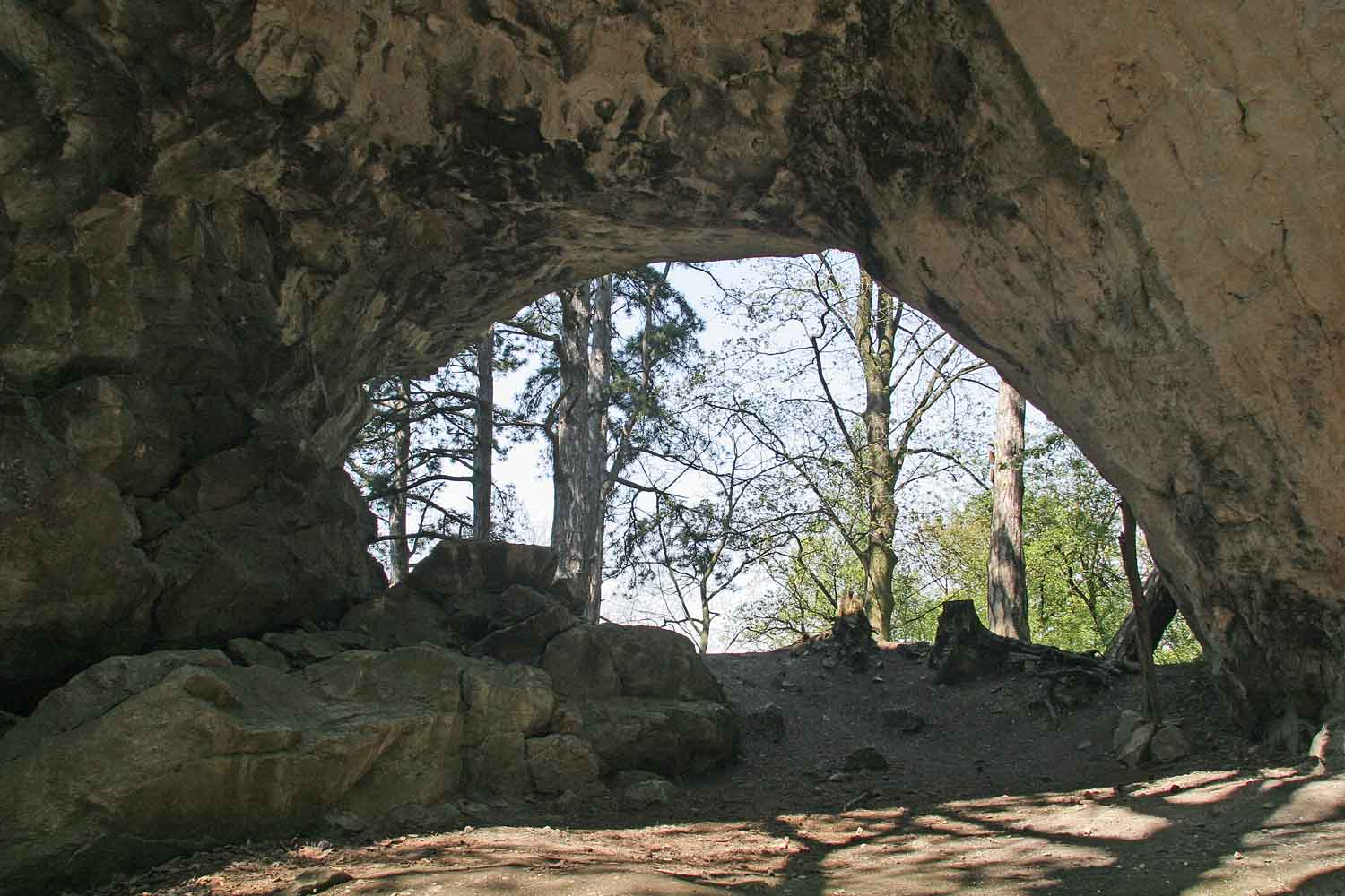 Axamitova brána na severním úpatí Kotýzu v Českém krasu.